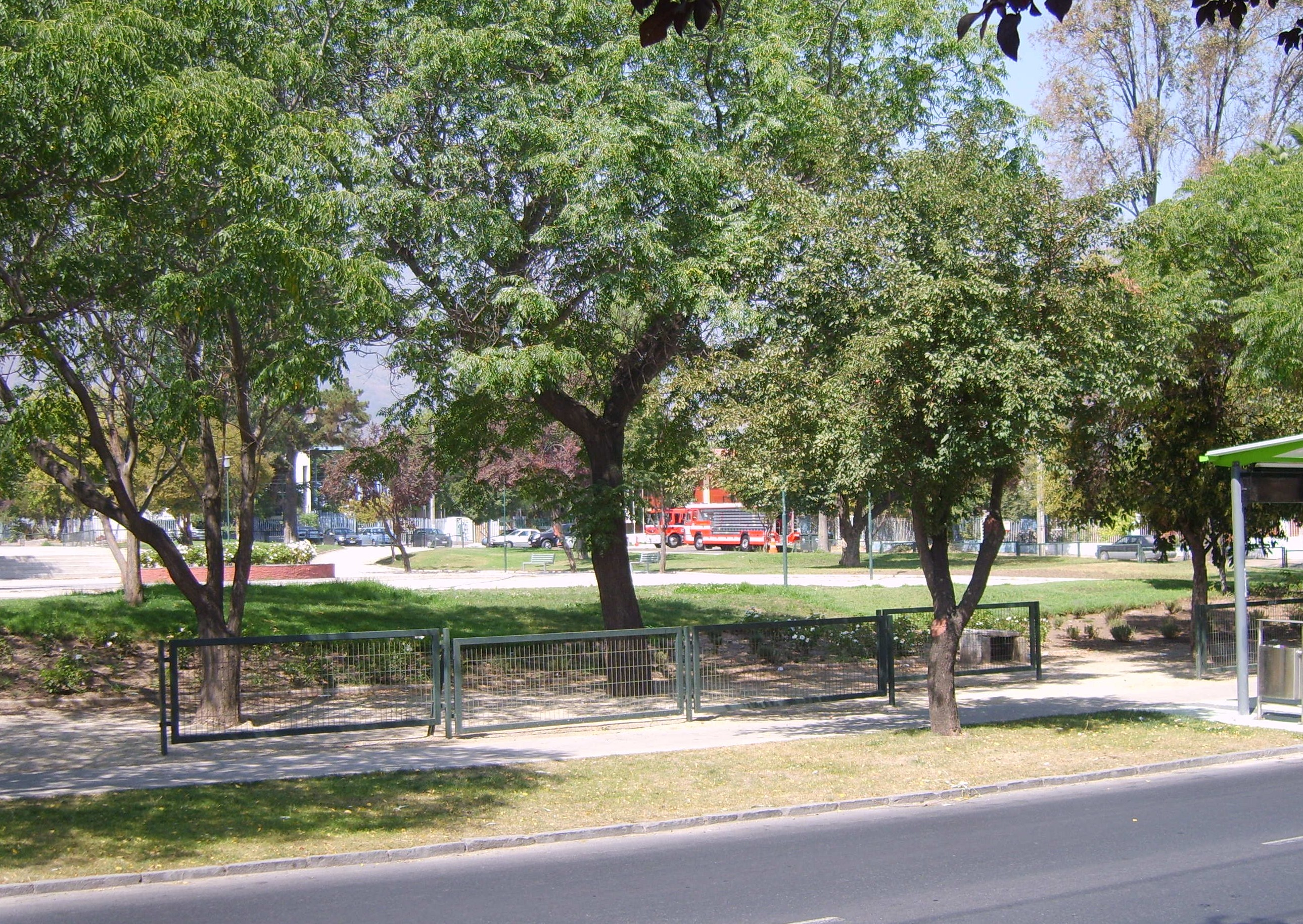 Plaza Ossandon, La Reina, Santiago de Chile